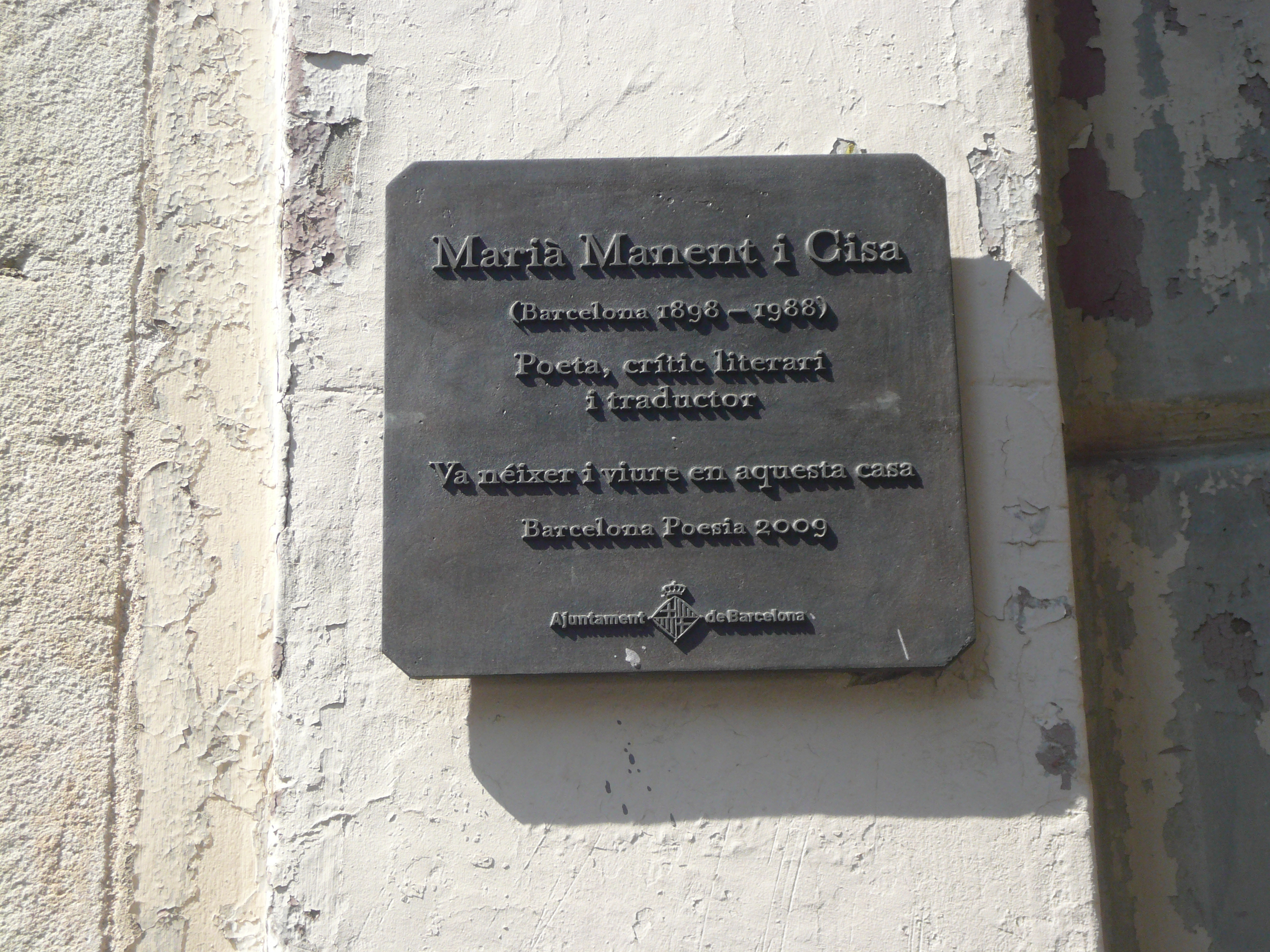 Placa commemorativa a Ciutat Vella.